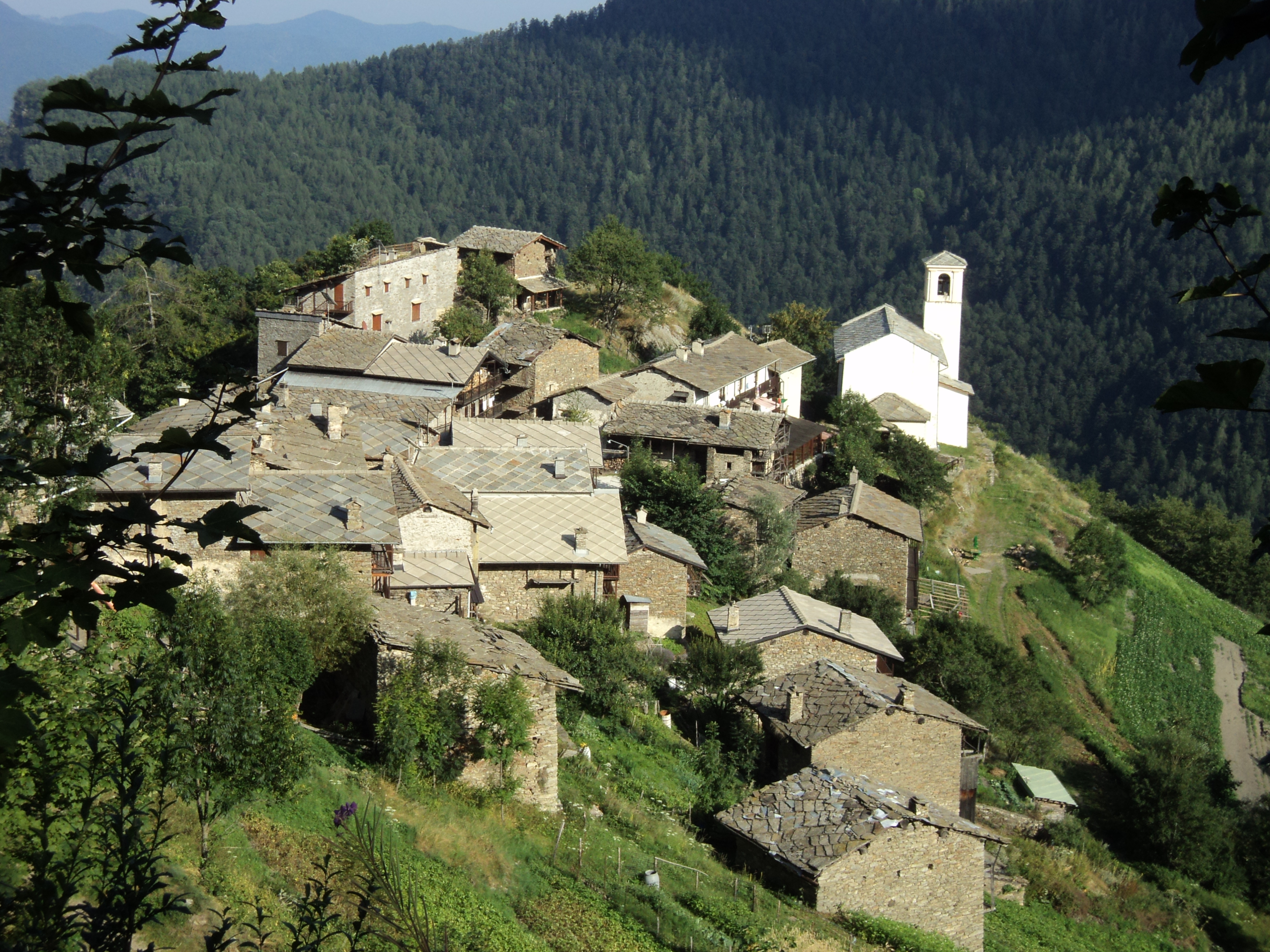 Chasteiran - borgo di Roure - Val Chisone - Provincia di Torino